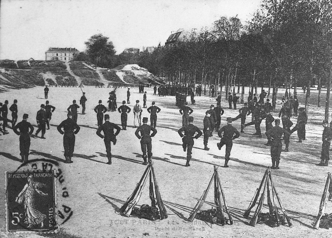 manœuvres devant les fortifications porte des sablons à Paris